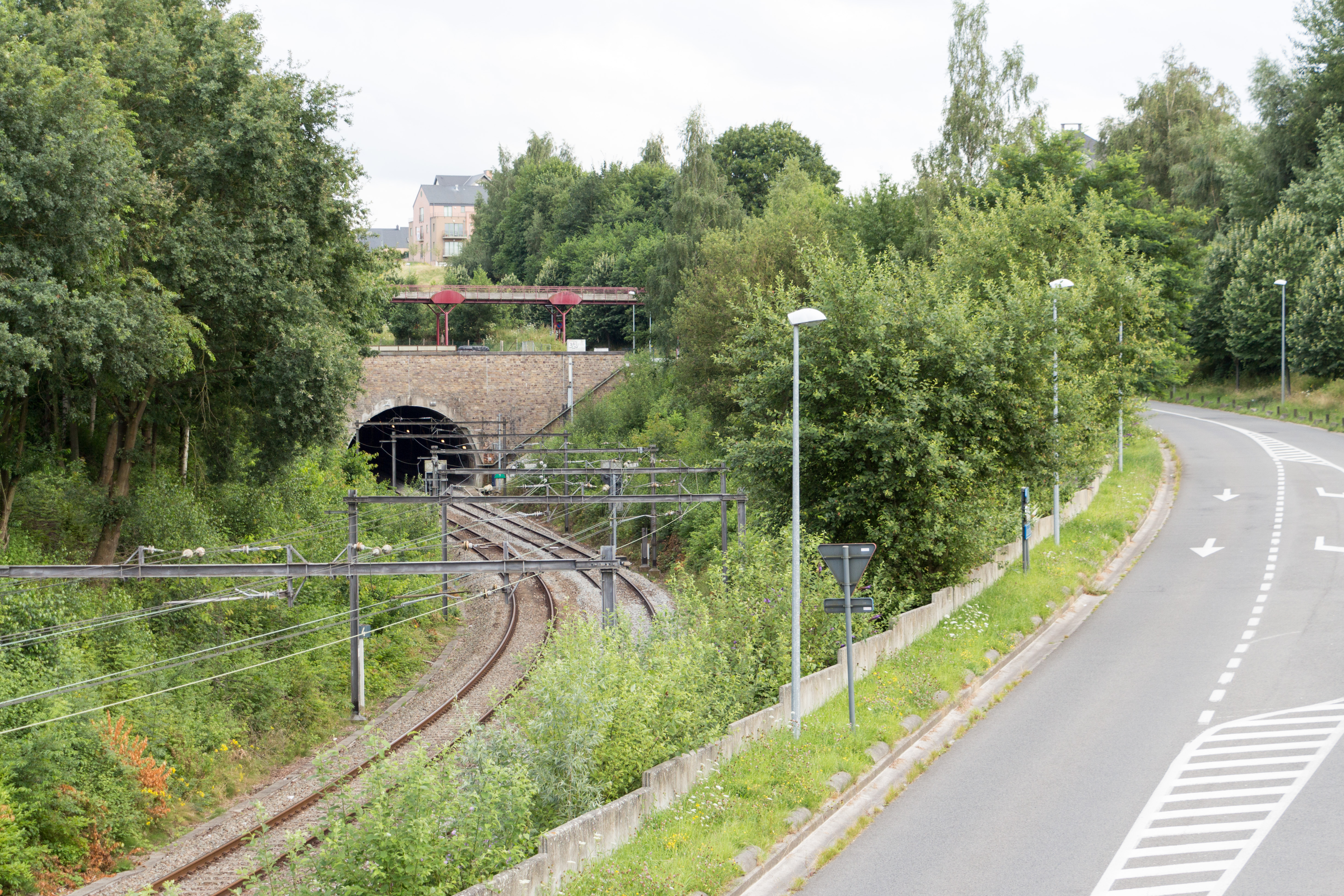 Tunnel ferroviaire du Biéreau, situé sur la ligne 161D reliant les gares d'Ottignies et de Louvain-la-Neuve-Université.